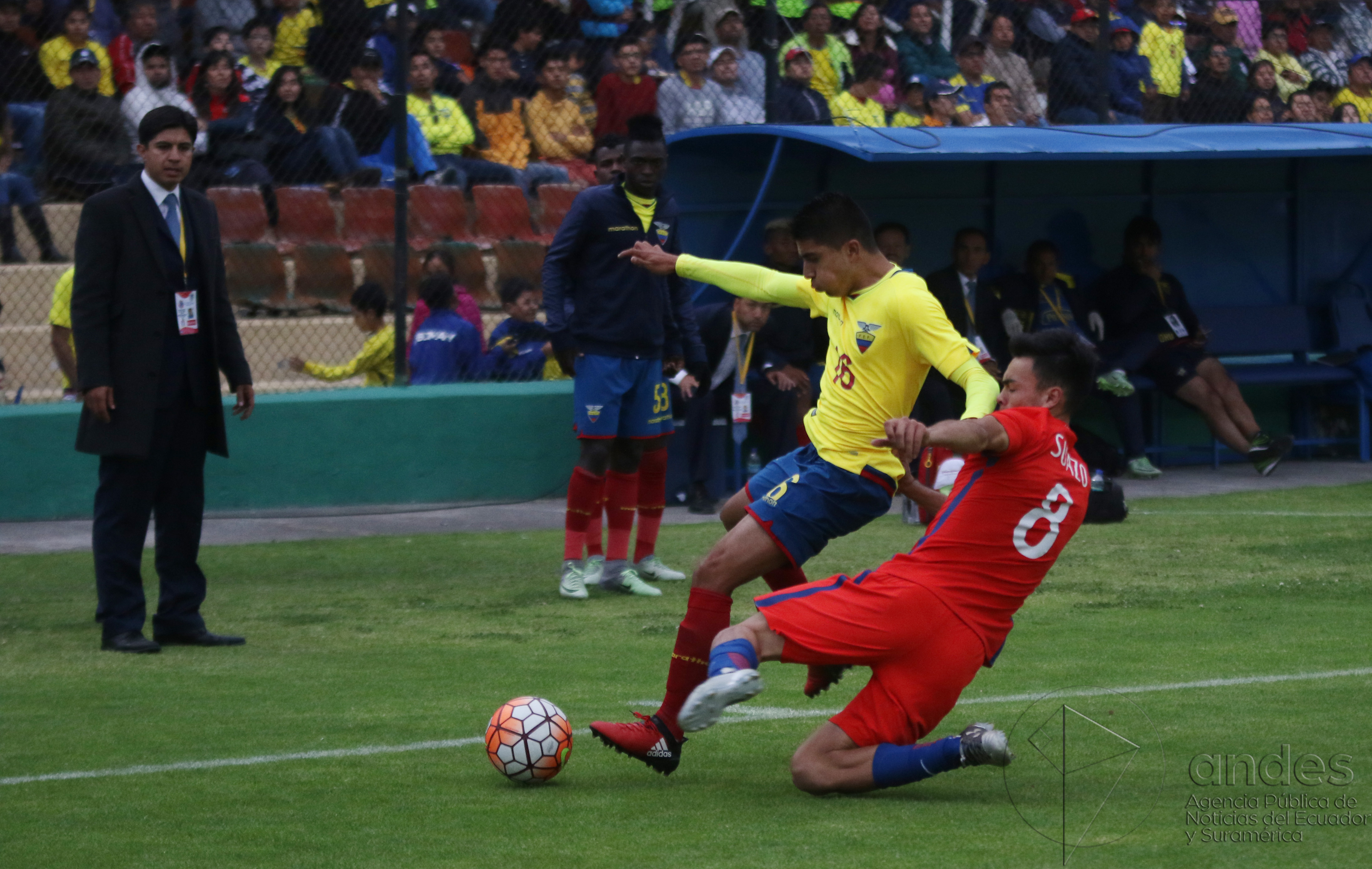 Ambato, Ecuador, 22 enero 2017 (Andes).- Ecuador igualó 1-1 este domingo con Chile en la ciudad de Ambato y dejó vivas las posibilidades de clasificar a la fase final del Campeonato Sudamericano Sub 20 del que es anfitrión, y se alista desde ya para jugar con Paraguay en la última jornada, el jueves próximo, en la ciudad ecuatoriana de Ríobamba. ANDES/Micaela Ayala V.